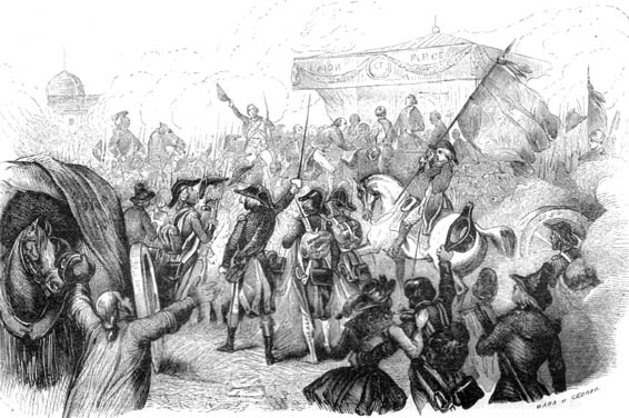 citoyens appliquer pour à un volontaire